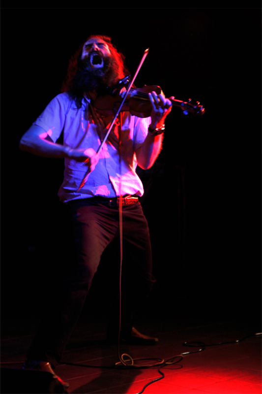 Dirty Three en concert à Milan